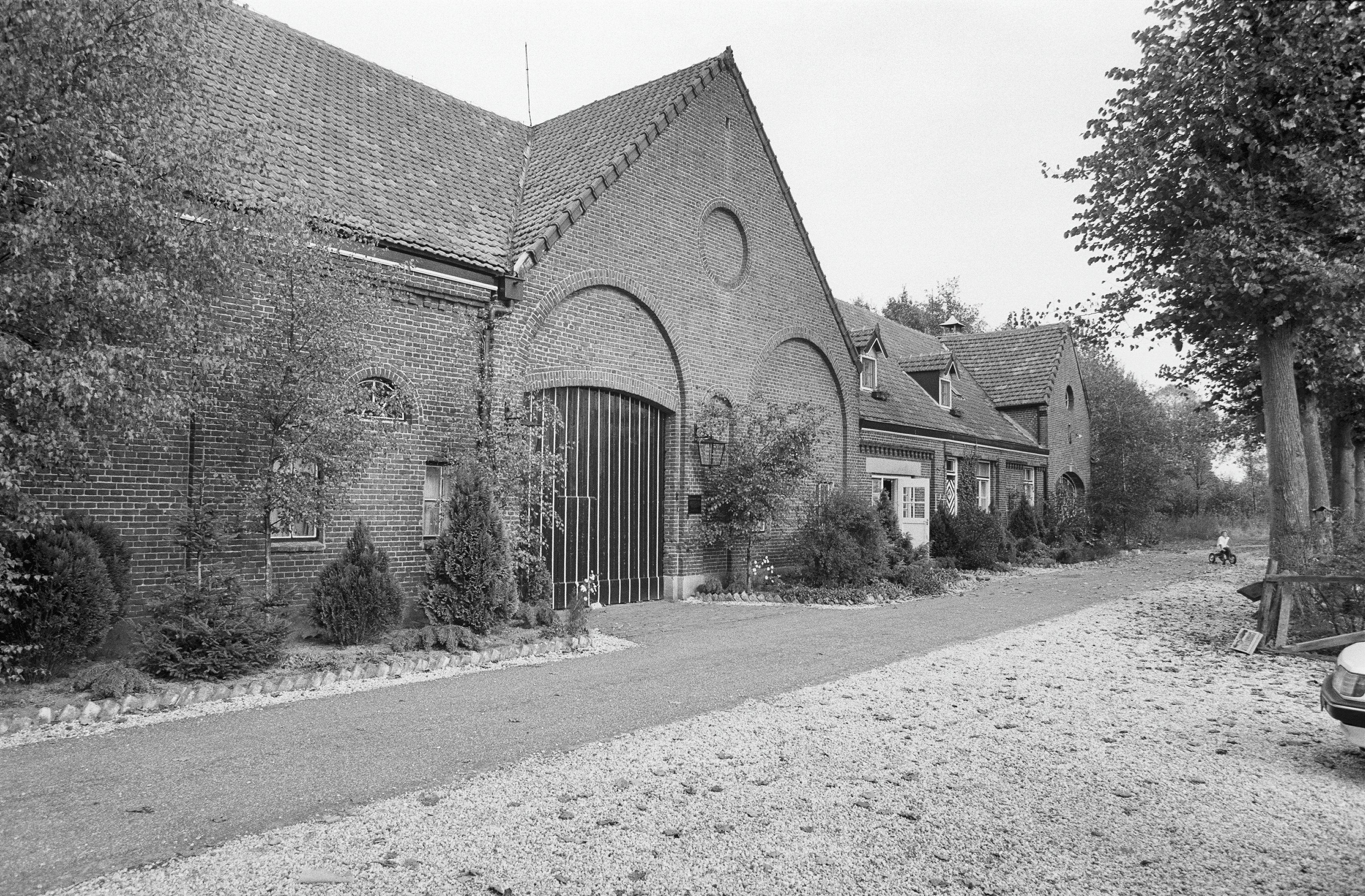 Voormalig Bierbrouwerij: Exterieur VOORGEVEL